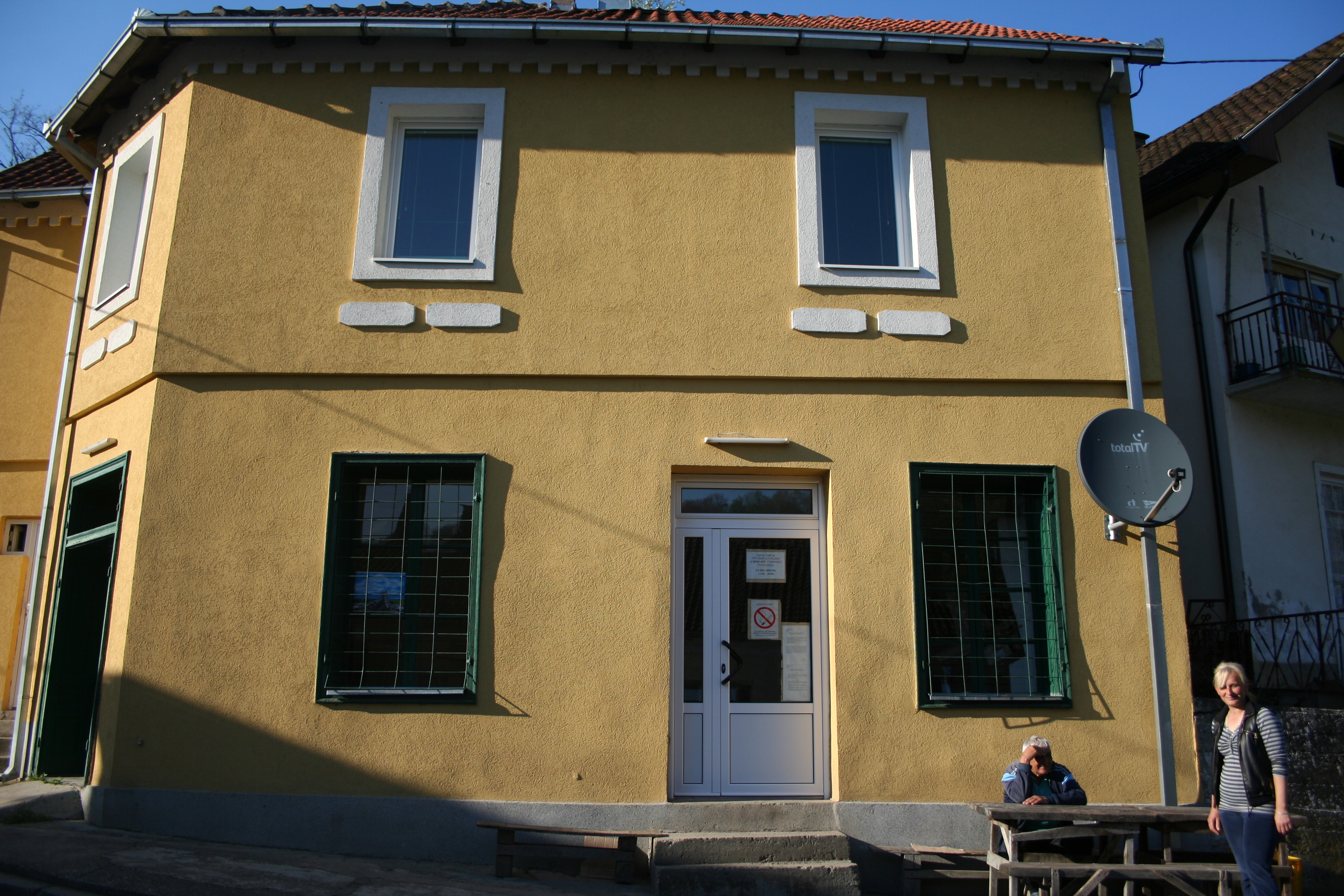 Centar sela, Gračanica